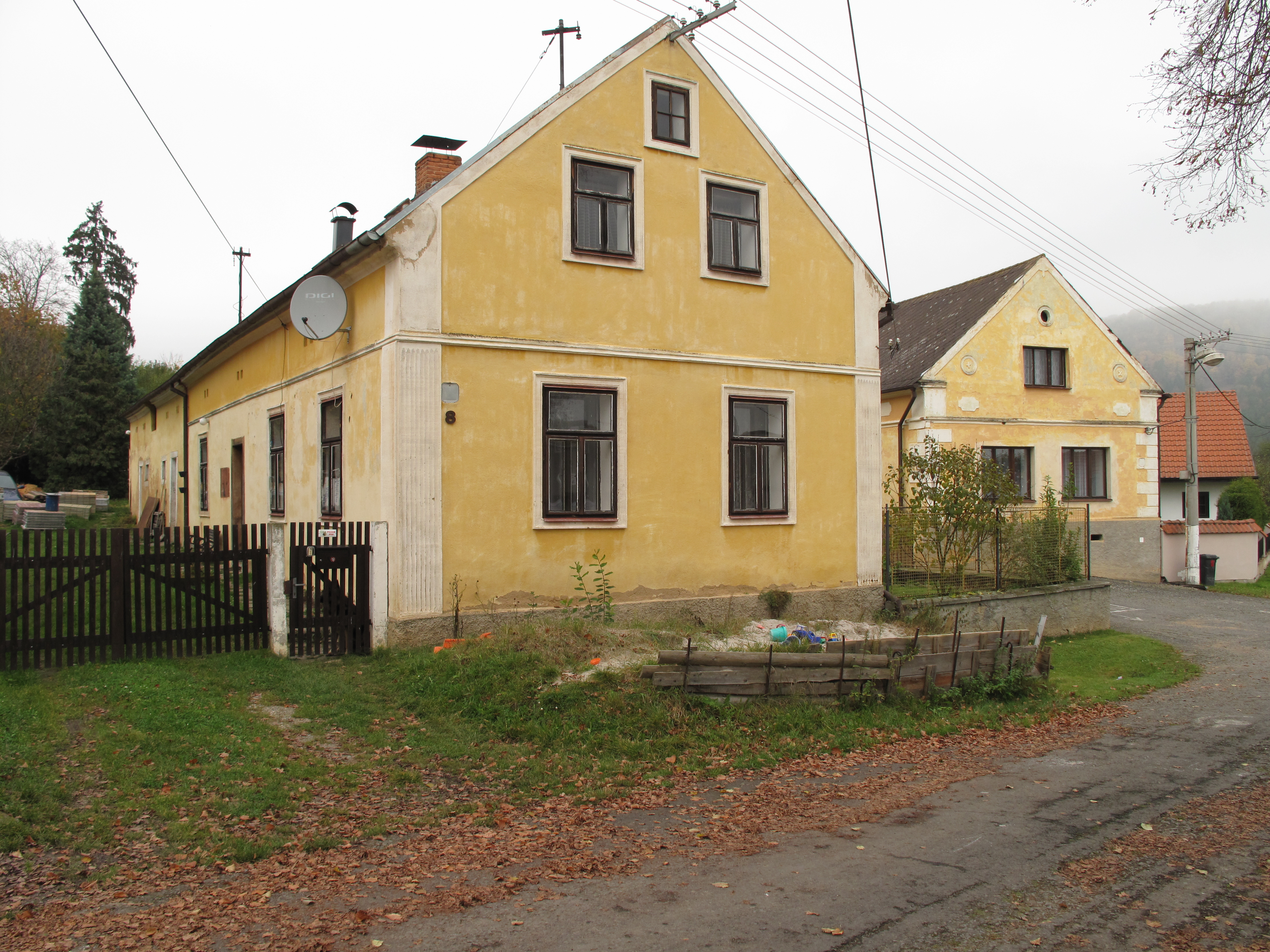 Dům v Újezdě. Okres Plzeň-sever, Česká republika.